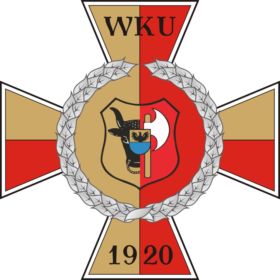 Odznaka Wojskowej Komendy Uzupełnień w Lesznie